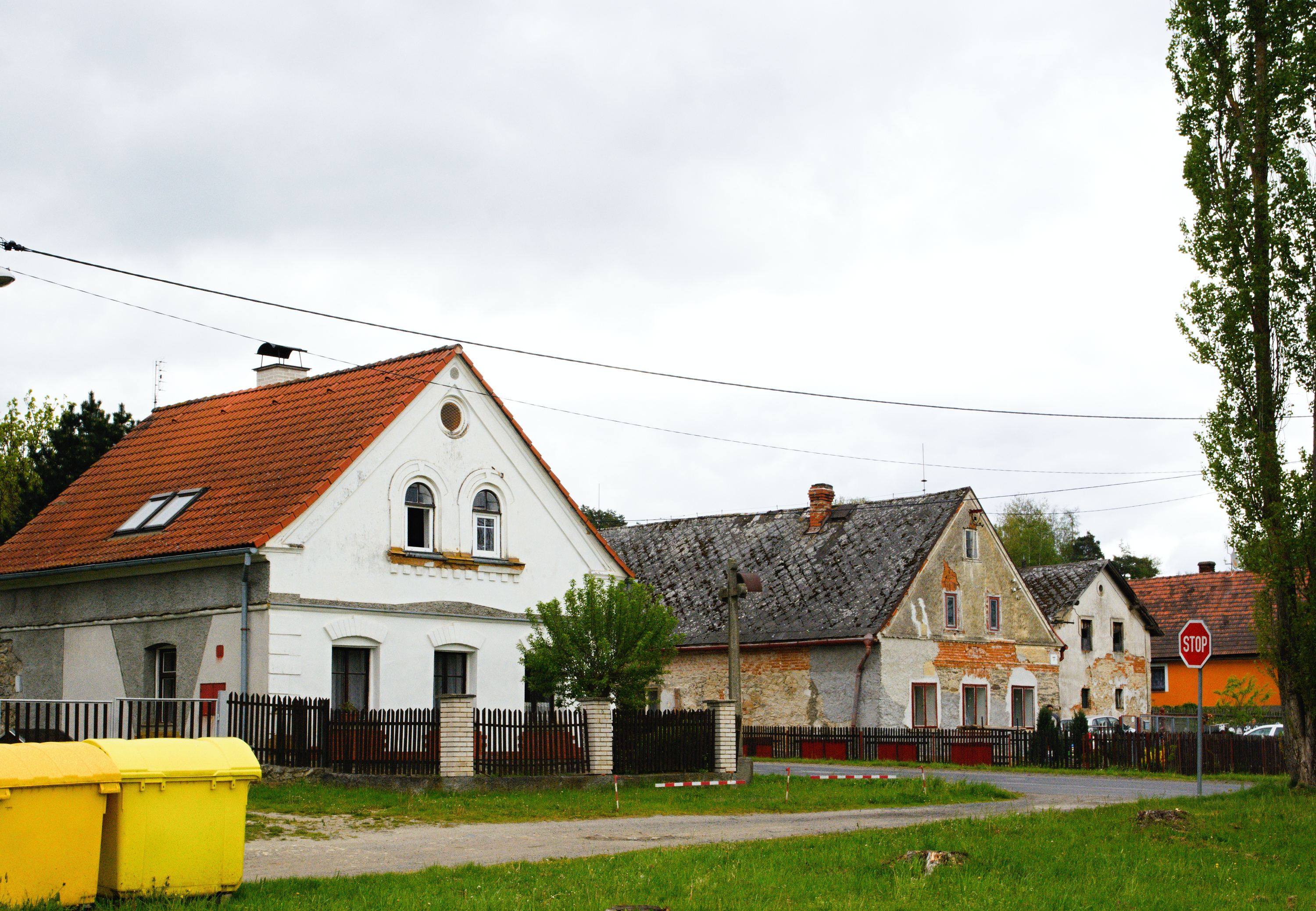 Bezděkov